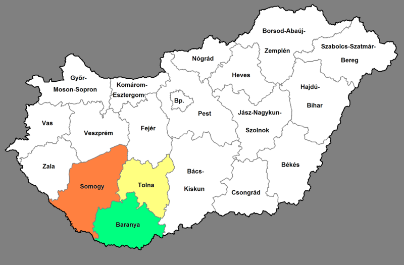 HU MAP (A Dél-Dunántúli régió Magyarországon., 2007.)